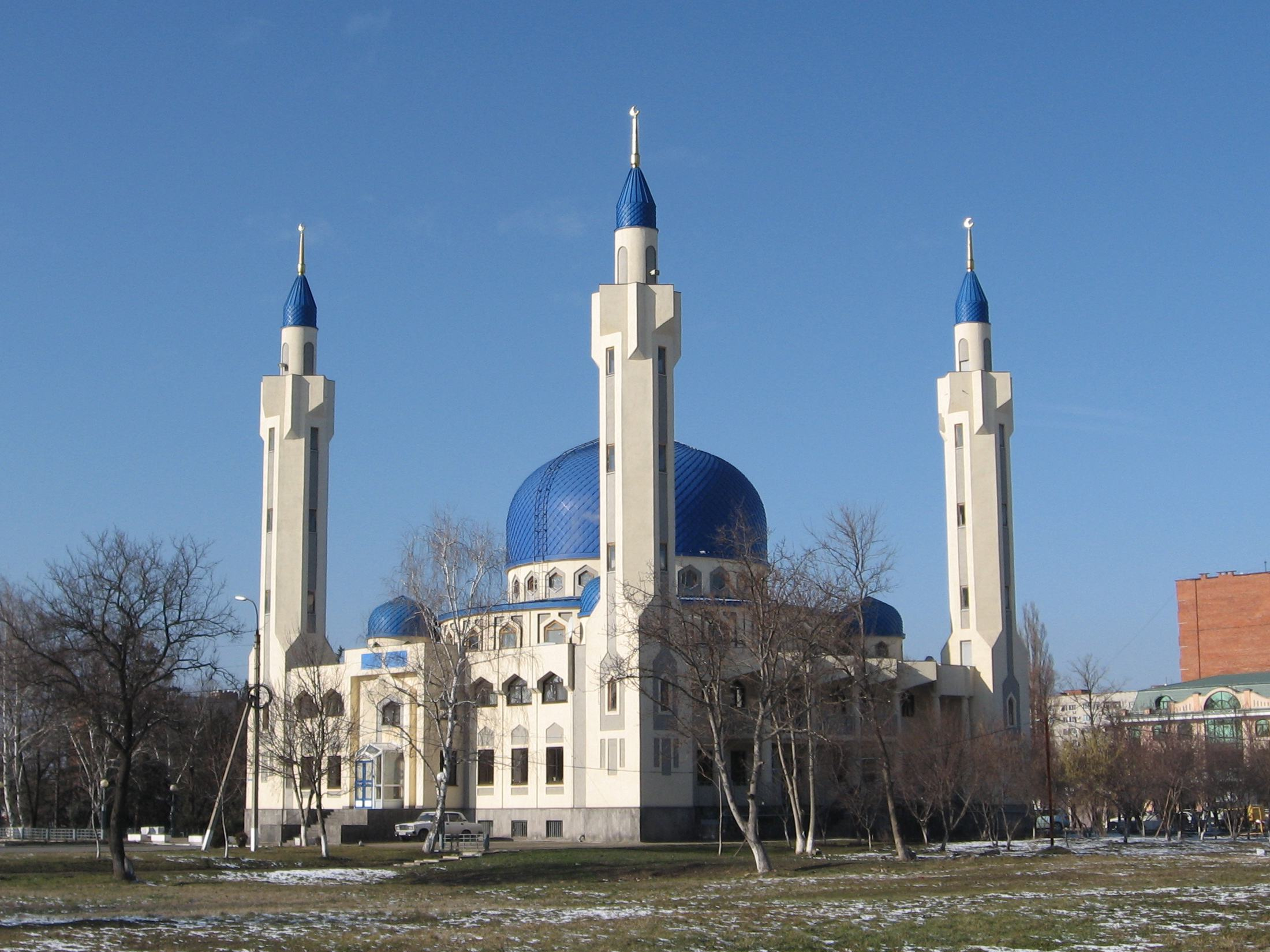 Большая соборная мечеть в Майкопе